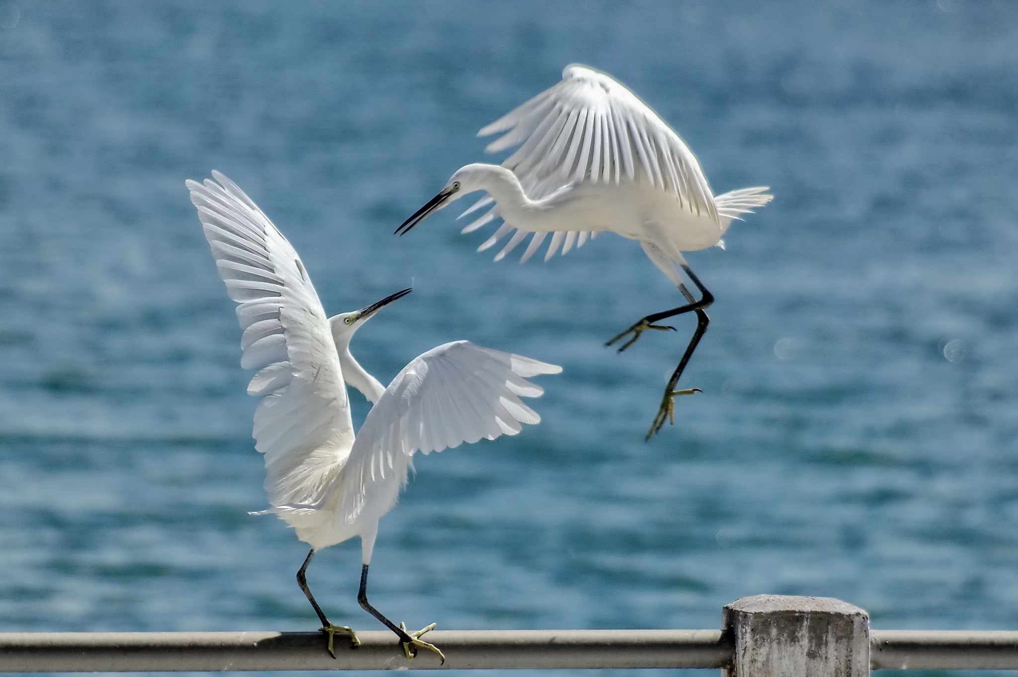 Egretta garzetta, Xiamen, China